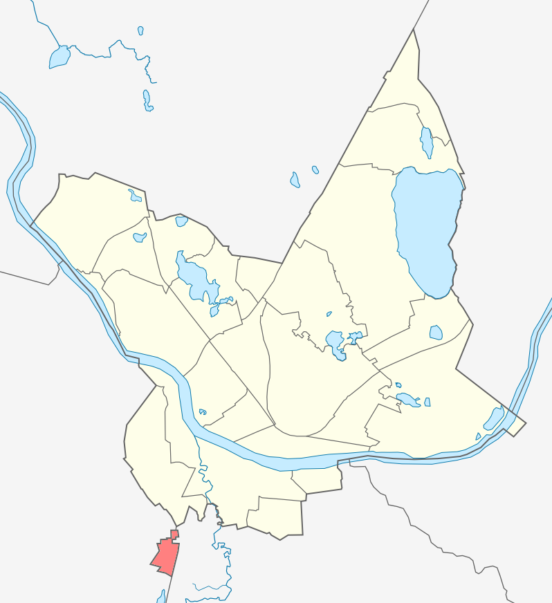 Микрорайон Калкуны карте Даугавпилса.